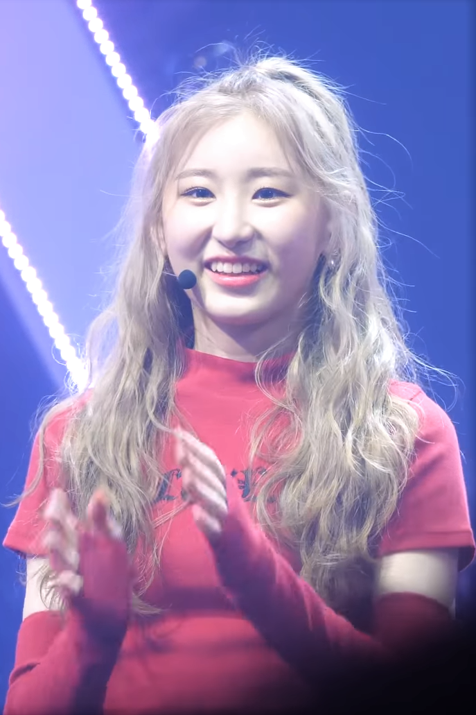 아이즈원 (IZ*ONE) '멤버별 데뷔소감' 직캠 Fancam @IZ*ONE SHOW-CON